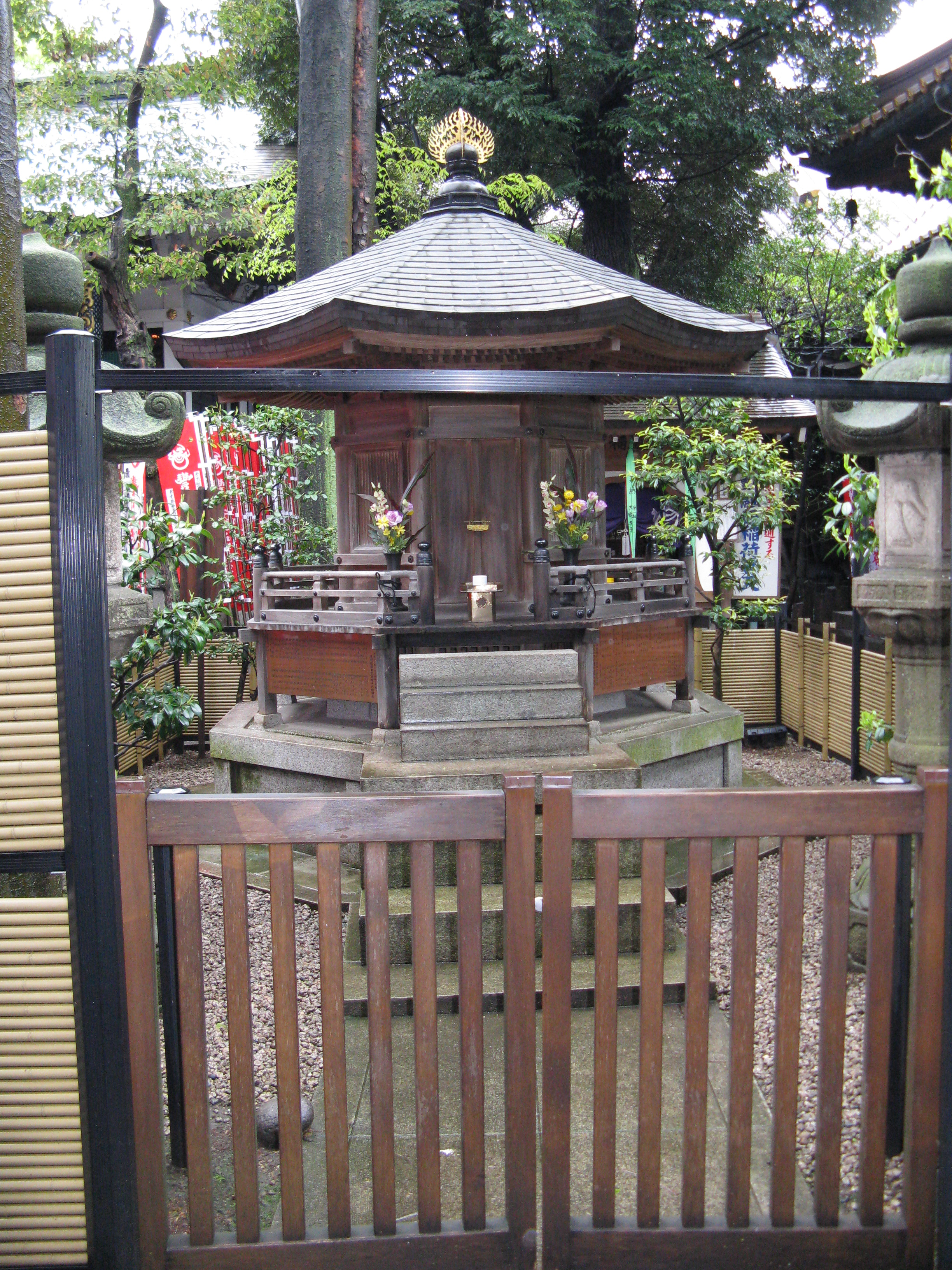 豊川稲荷東京別院 大岡忠相廟